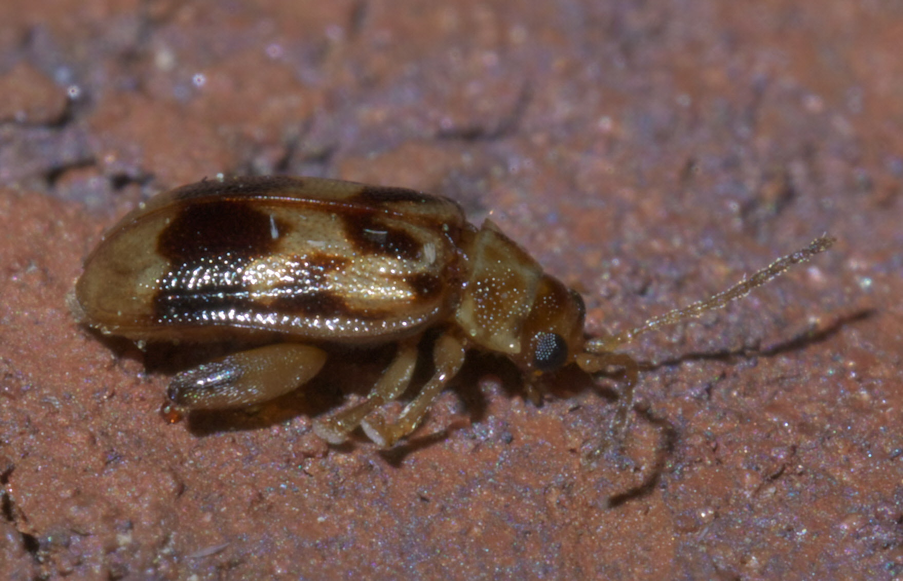 Capraita sexmaculata, Tribe: Flea Beetles, ID Confidence: 98